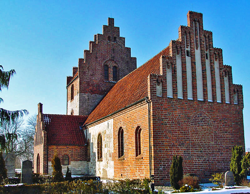 fra sydøst